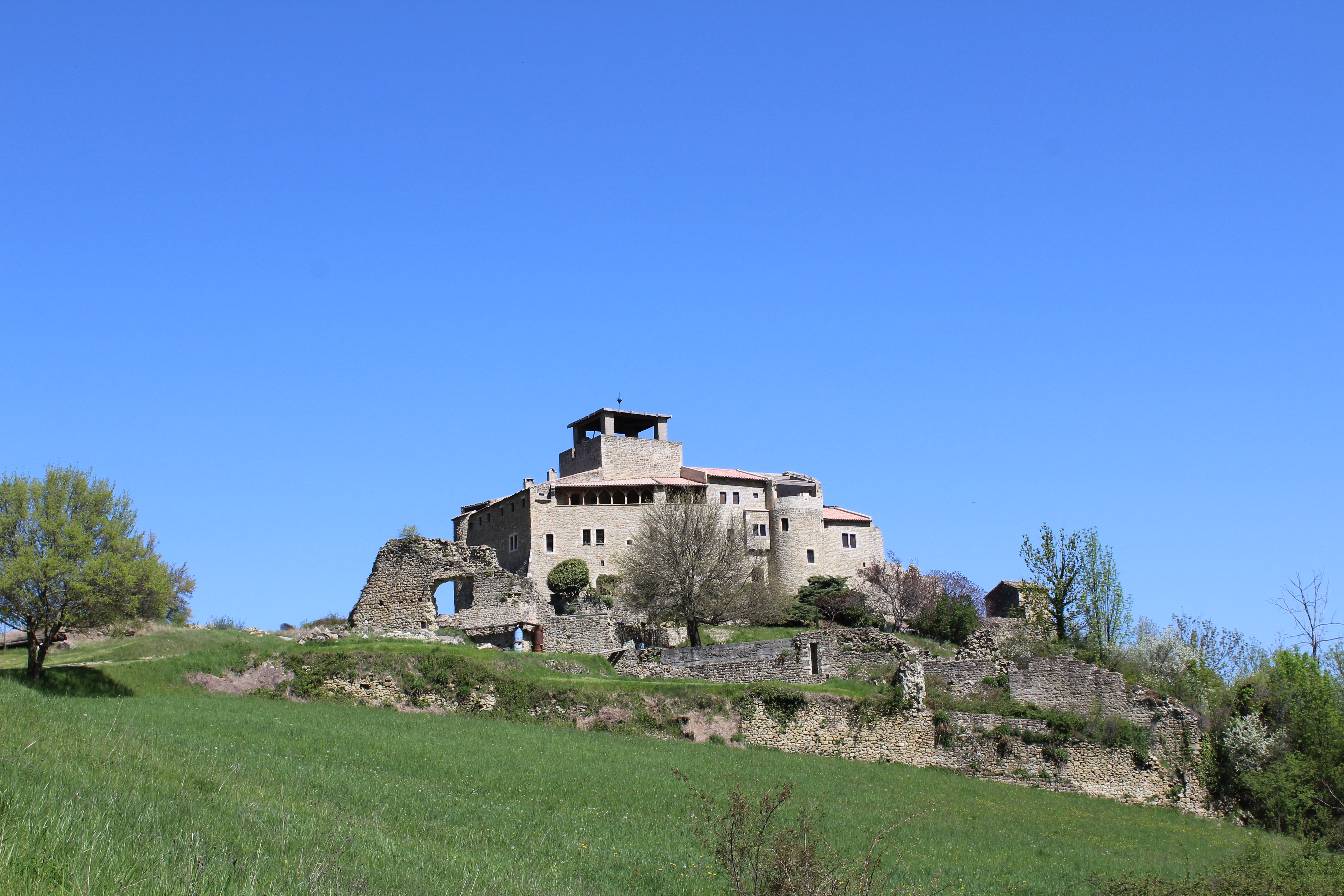 Photographie du château de la commune de Piégros-la-Clastre